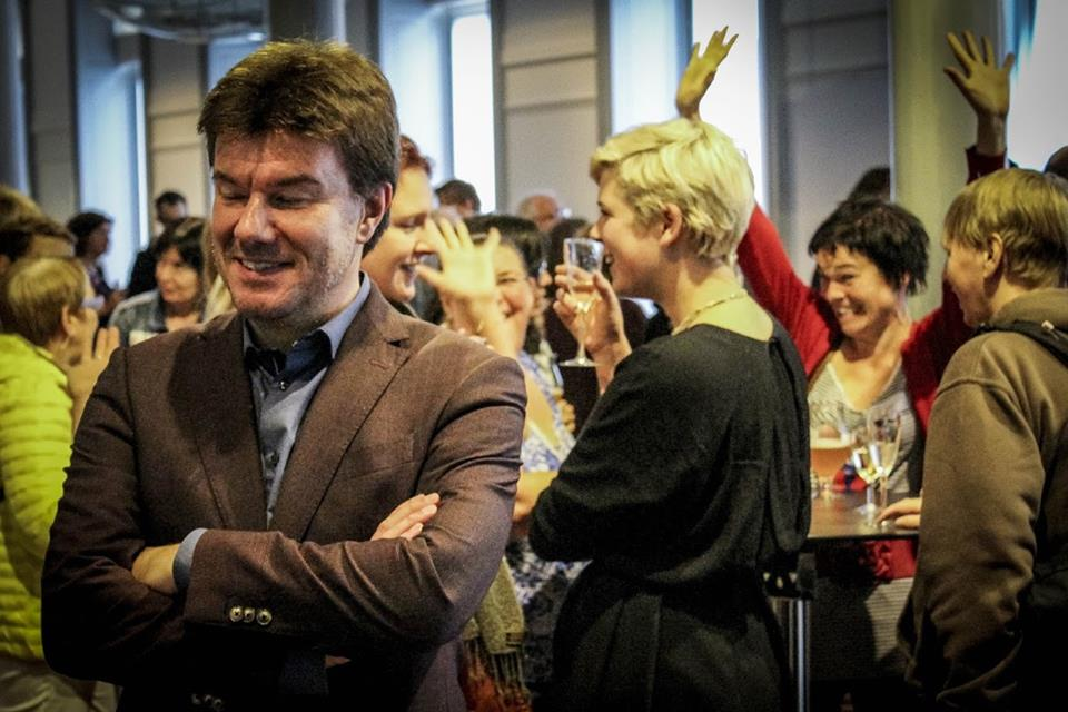 Sven Gatz